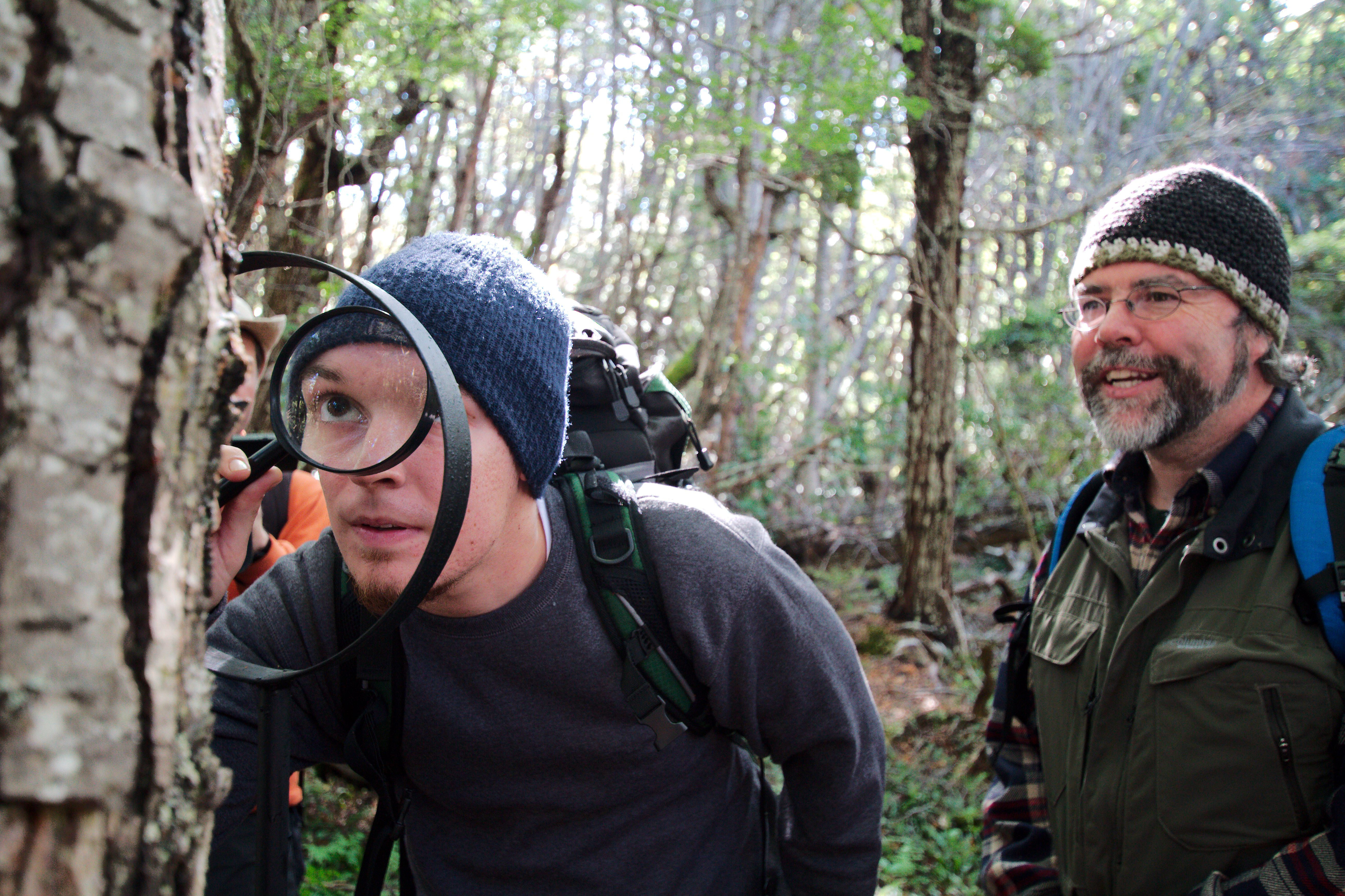 Ecoturismo con lupa realizado en el Parque Omora, Reserva de la Biosfera Cabo de Hornos